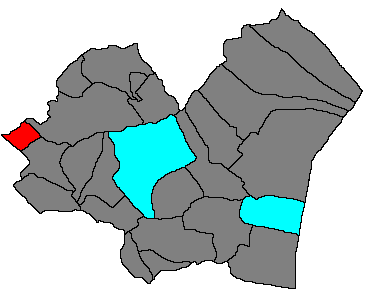 Bezirk Eisenstadt-Umgebung